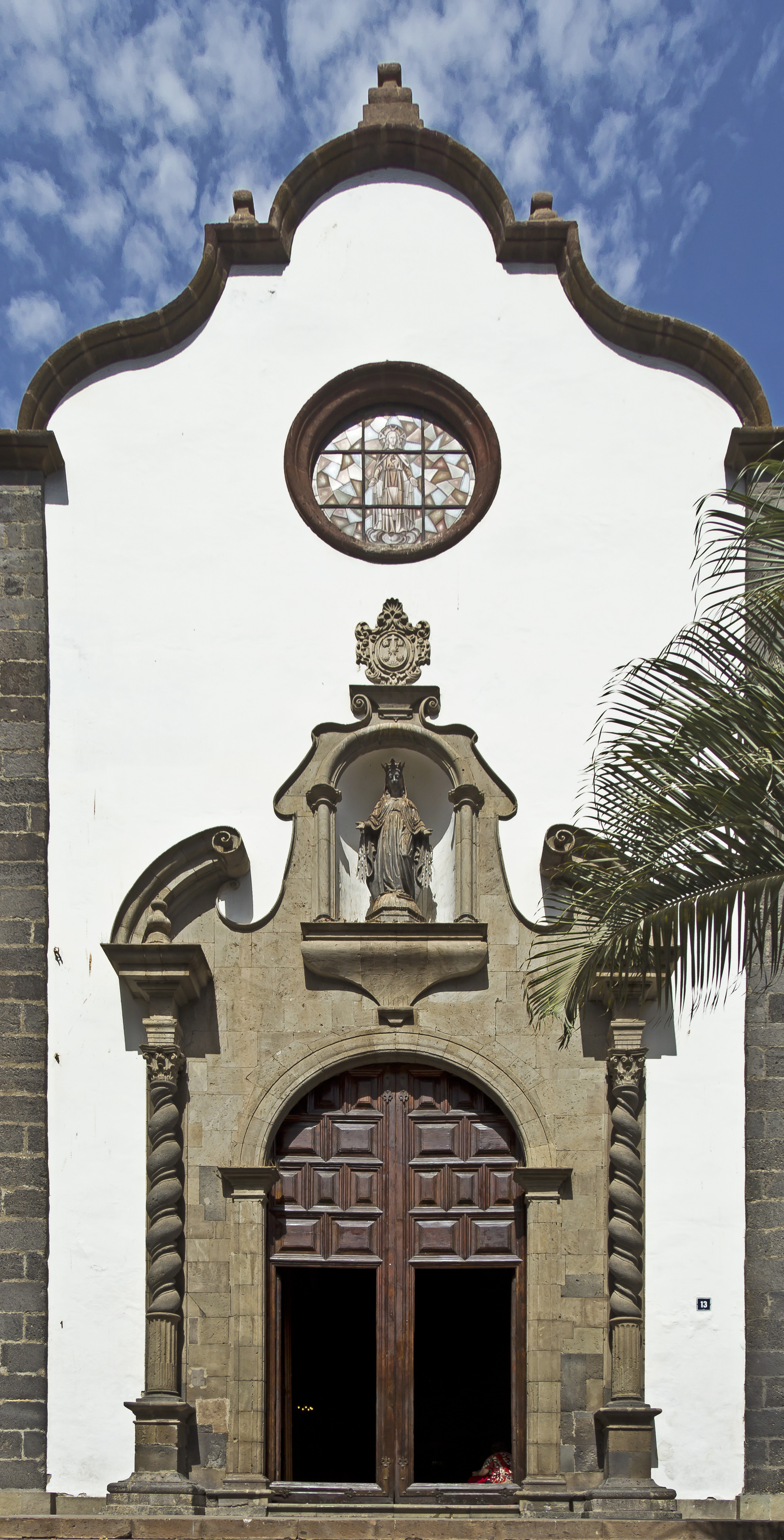 Mittelteil der Fassade der Kirche San Francisco in Santa Cruz de Tenerife